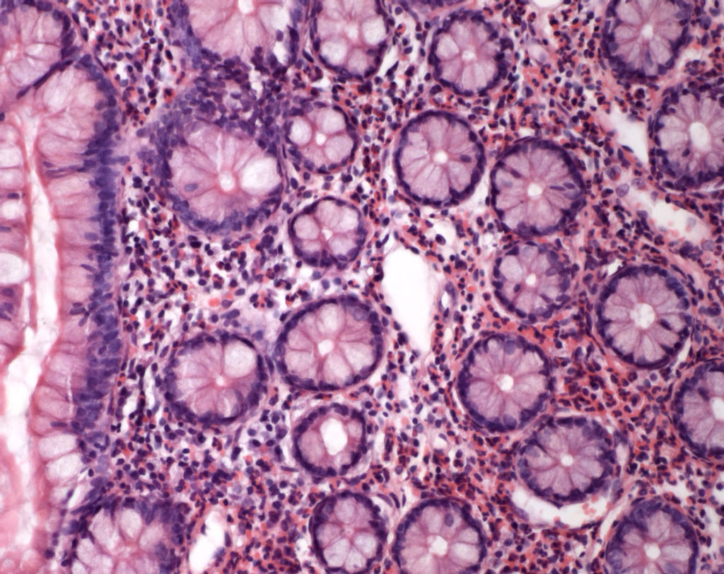 biopsia endoscopica